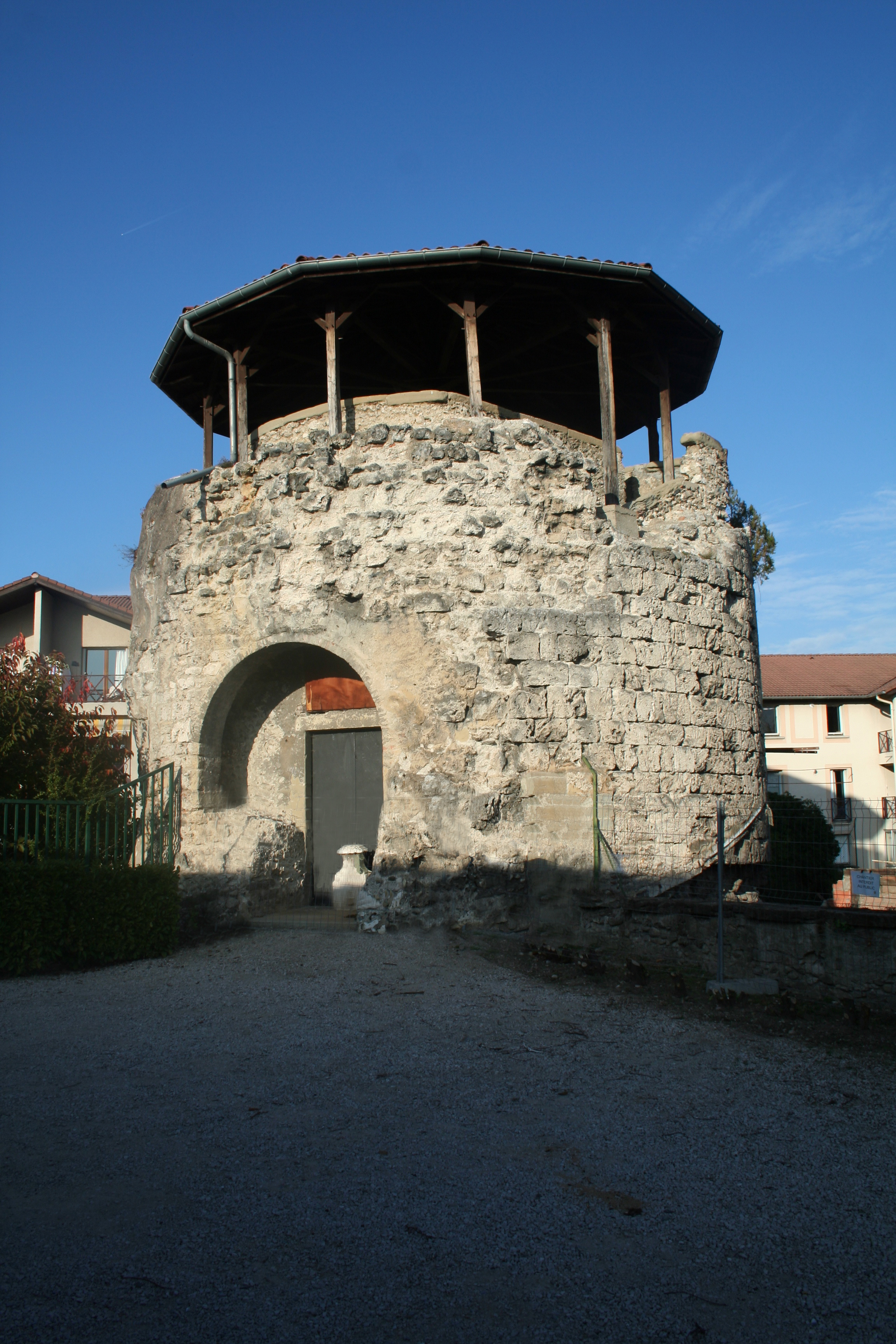 Moirans (Isère) - Ancienne Tour.